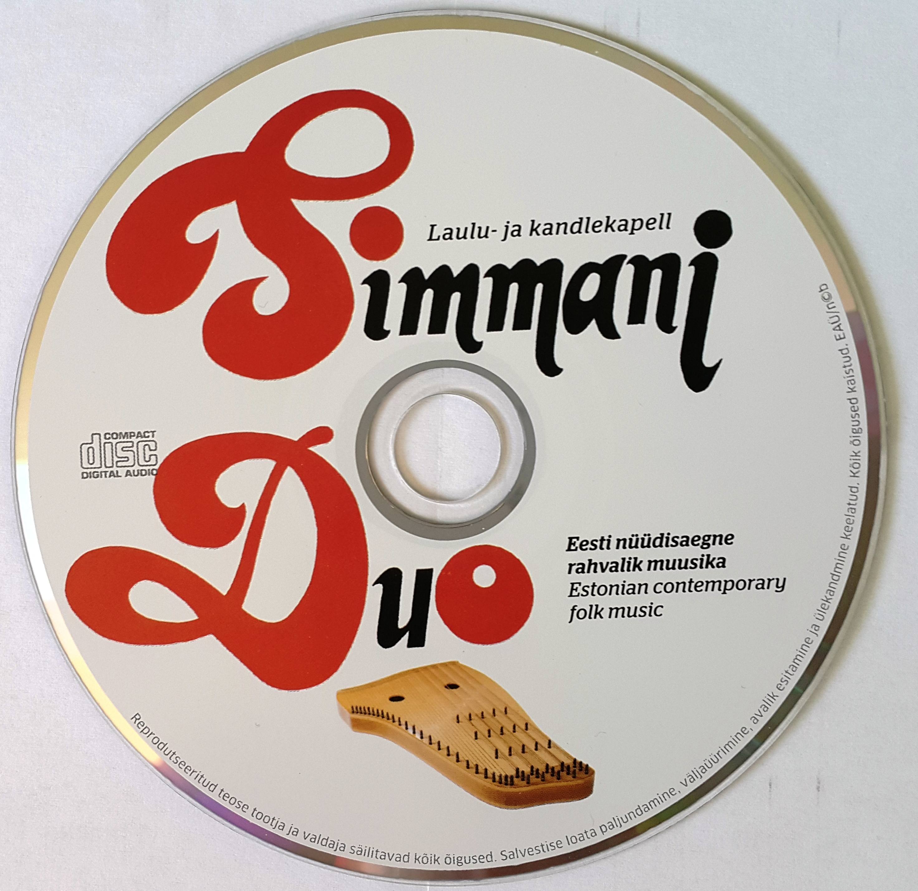 Simmaniduo Tule simmanile CD